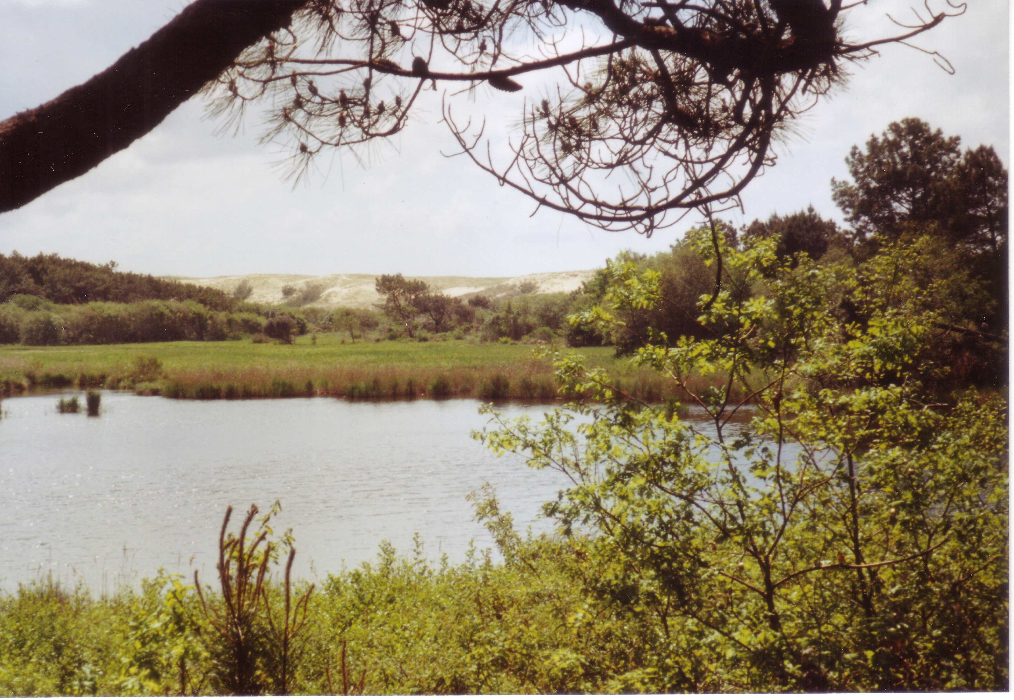 Le Courant d’Huchet dans les Landes